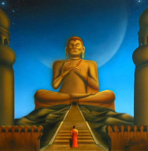 Ein weiteres Beispiel um die Möglichkeiten der Airbrush-Technik zu zeigen ist das Bild "Dambulla" von Marcus Brazel.